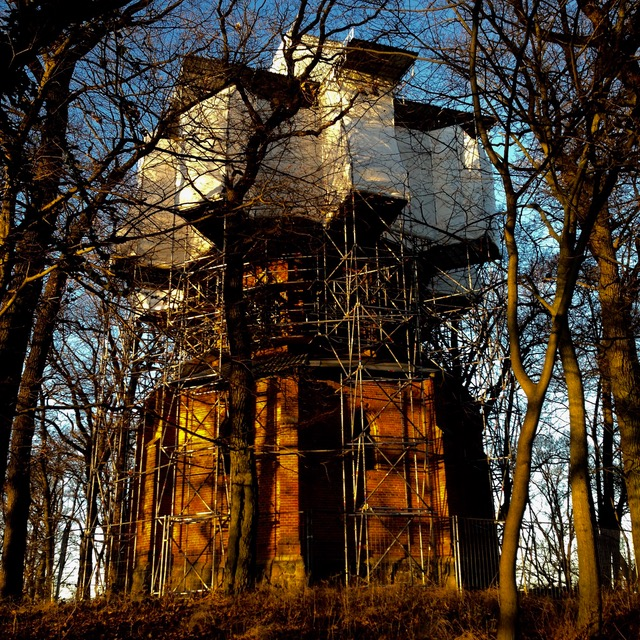 Jahn Kapelle Außenansicht Dezember 2016